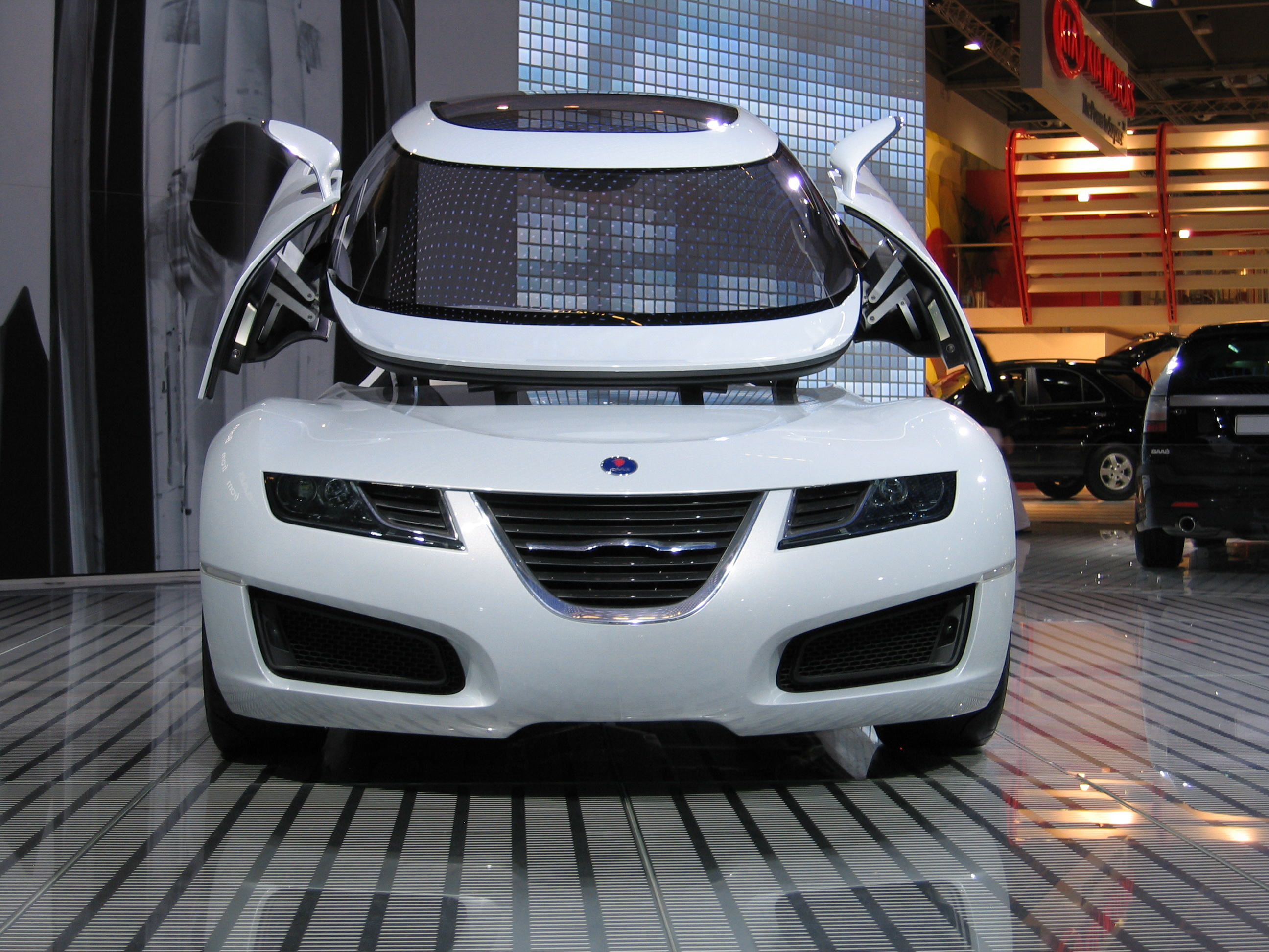 Saab Aero X Concept